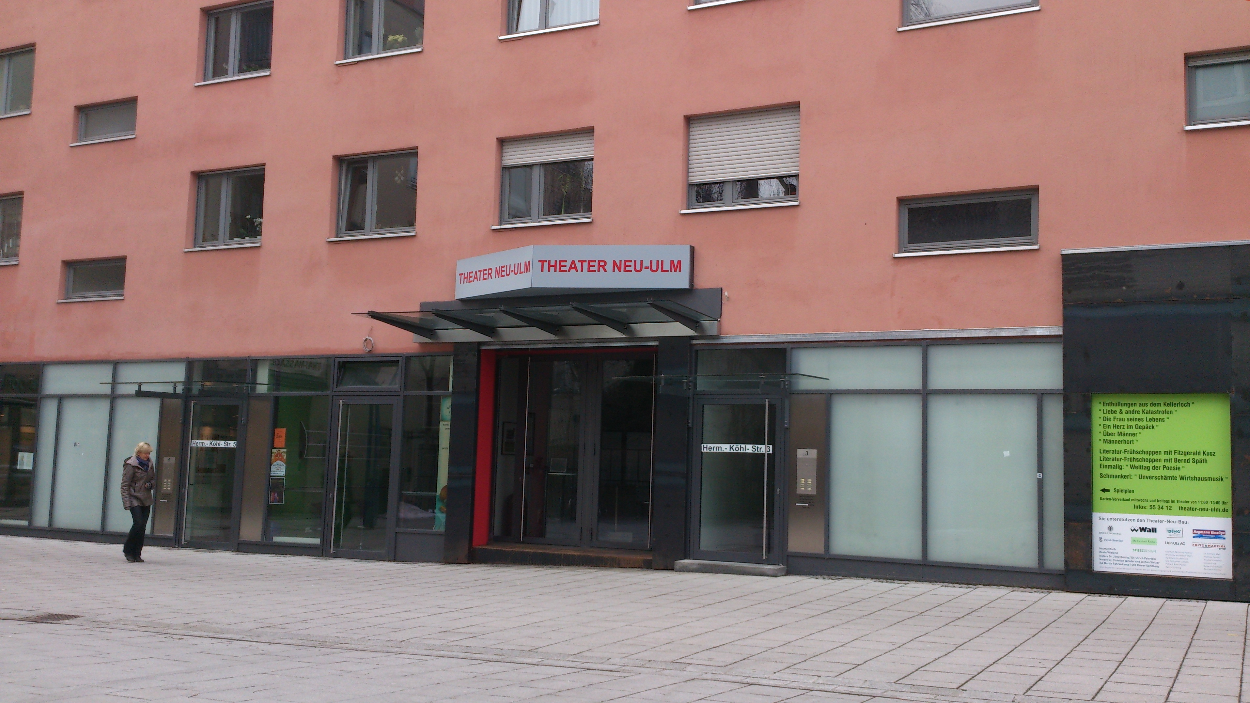 Hermann-Köhl-Straße 3, 89231 Neu-Ulm ▬ Das neue Theater Neu-Ulm in der Fußgängerzone.